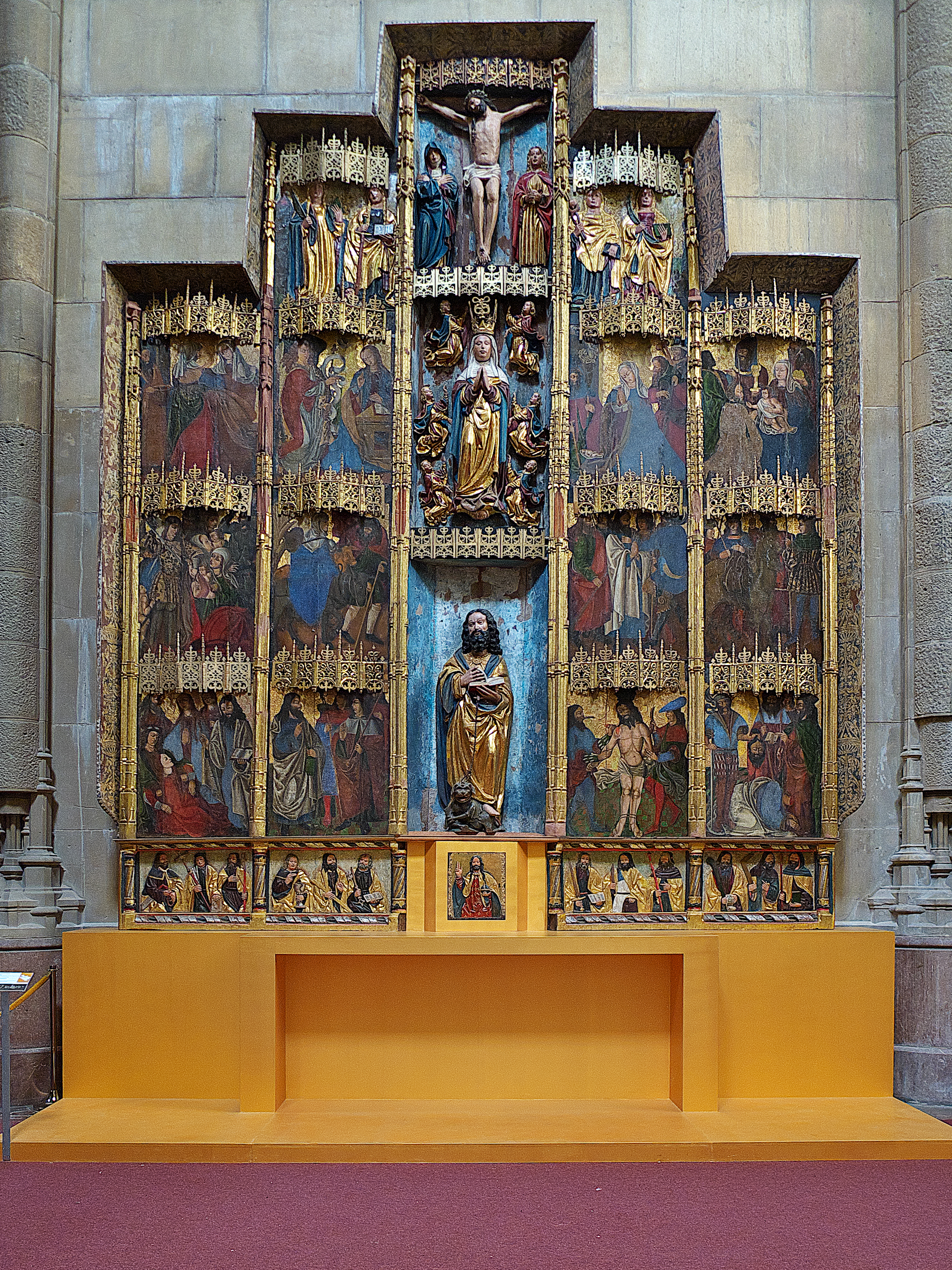 Actualmente se expone en la Catedral Nueva de Vitoria. Restaurada la interesante obra tardogótica, primera mitad del siglo XVI, con algunos elementos renacentistas. Dedicado a San Barolomé, patrón de Olano, y a la infancia de Jesús. Las tablas con pinturas de influencia flamenca.